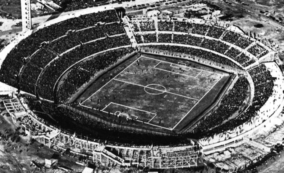 Foto del estadio Centenario en 1930